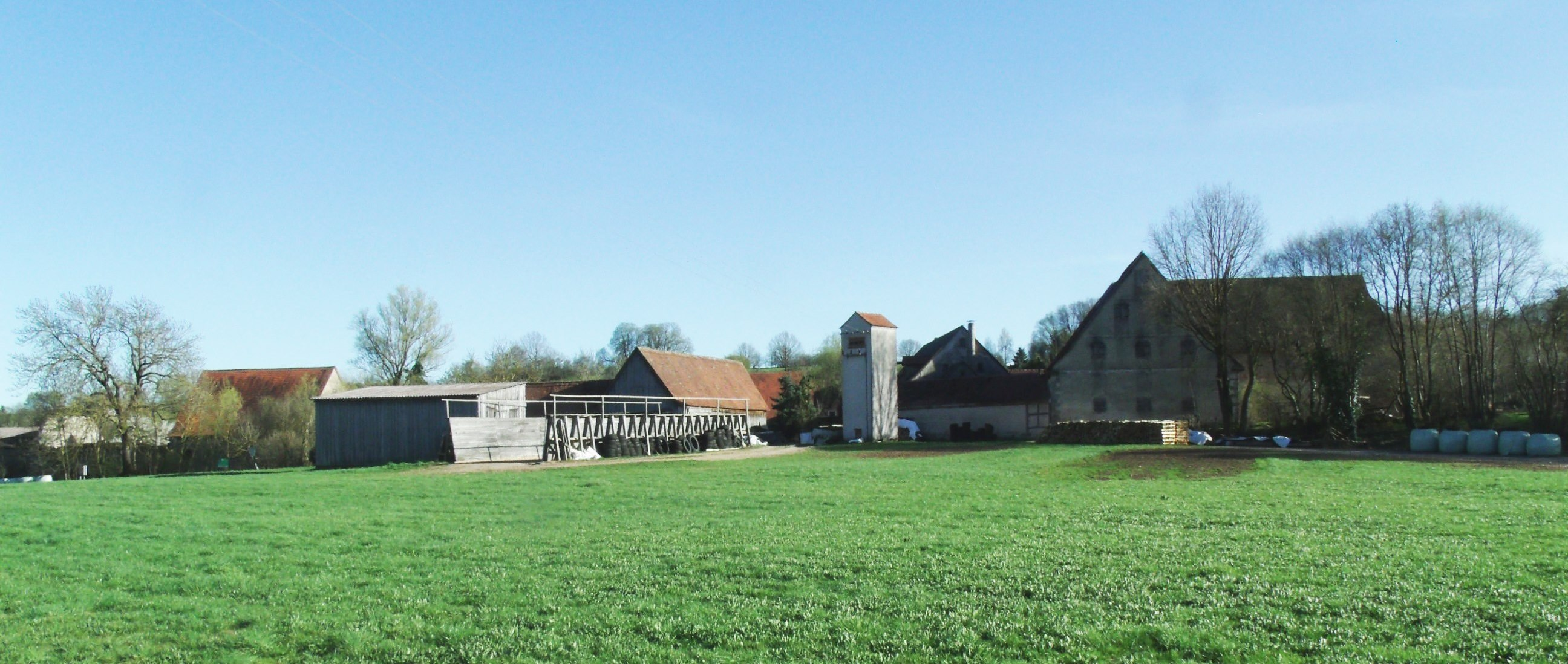 Lenzersdorf, Ortsteil von Leutershausen im Landkreis Ansbach